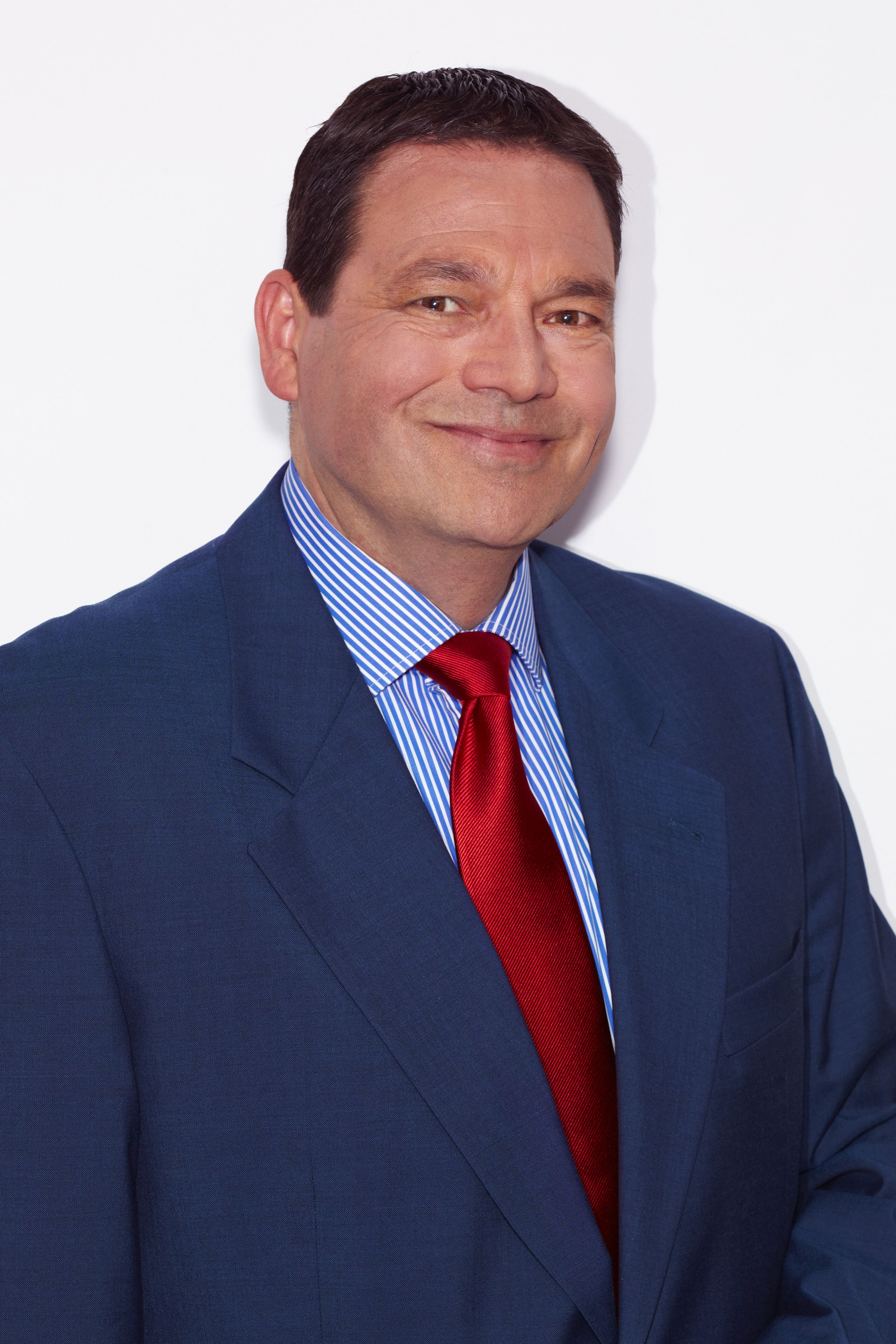 Rik Janssen, Nederlands politicus voor de SP